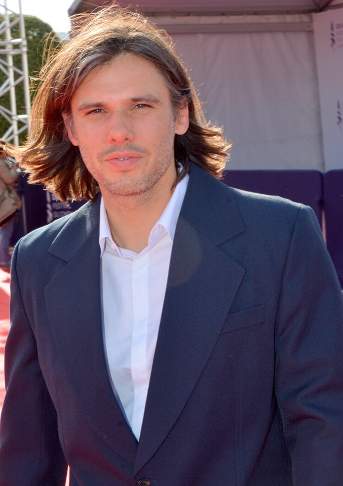 Orelsan Deauville 2019